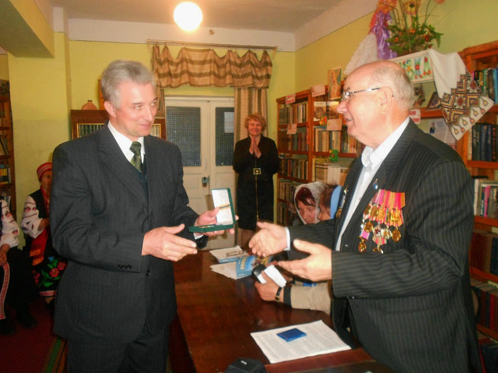 На зустрічі з земляками в селі Іванівка Білоцерківського району.